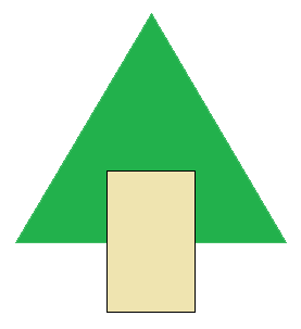 Símbolo utilizado por el Partido Ecologista Verde de Chile en las papeletas de voto para las elecciones municipales de 2012. Basado en símbolo que aparece en [1]